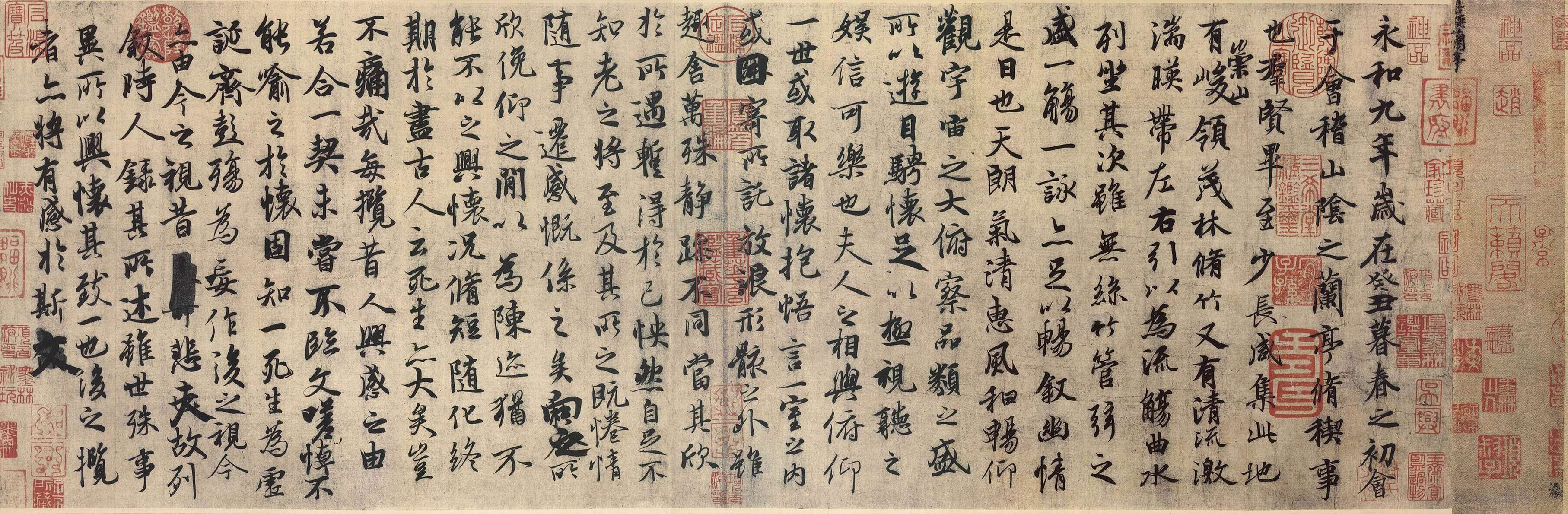 王羲之的《兰亭序》，原件已经失佚，这是唐代zh:冯承素的zh:摹本，又称“神龙本兰亭”，现藏zh:北京博物馆。